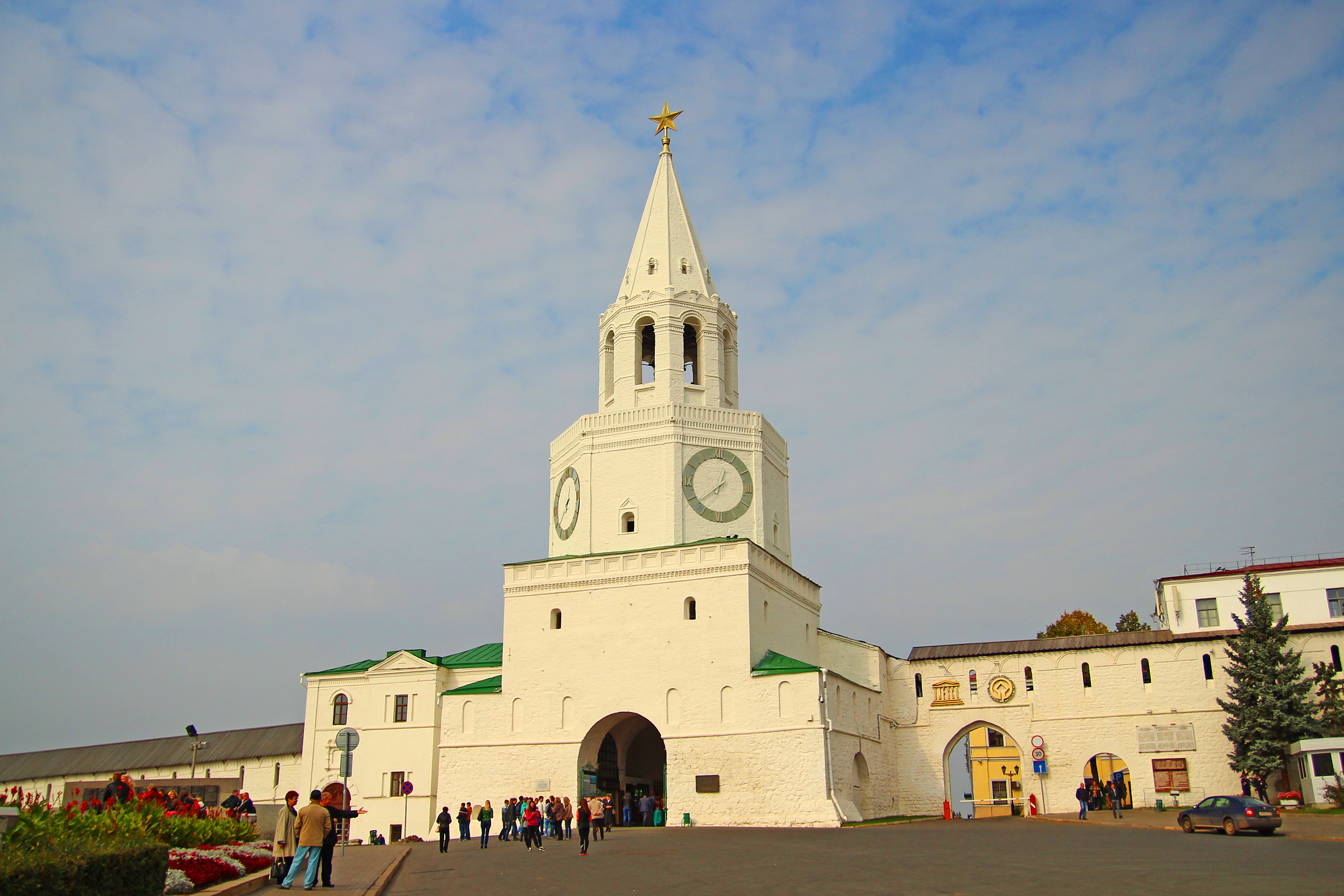 Башня Спасская (Республика Татарстан, Казань, Кремль)